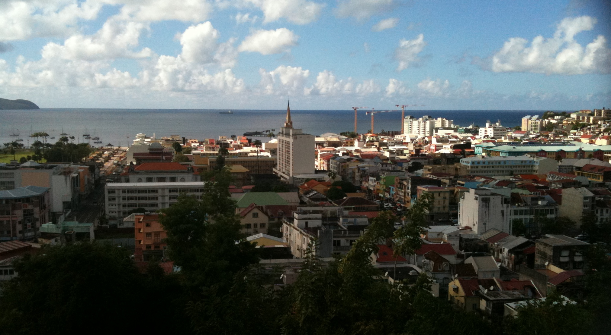 Fort-de-France